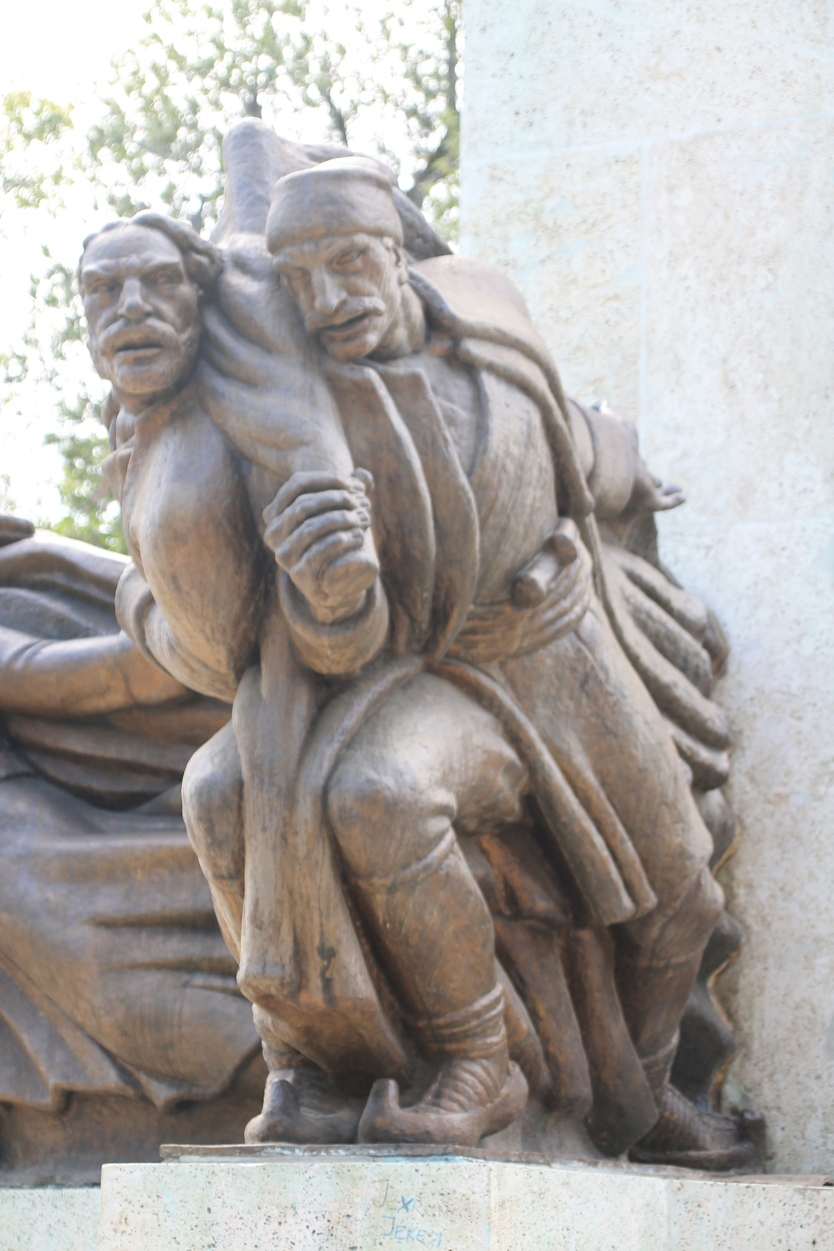 Spomenik palim Šumadincima